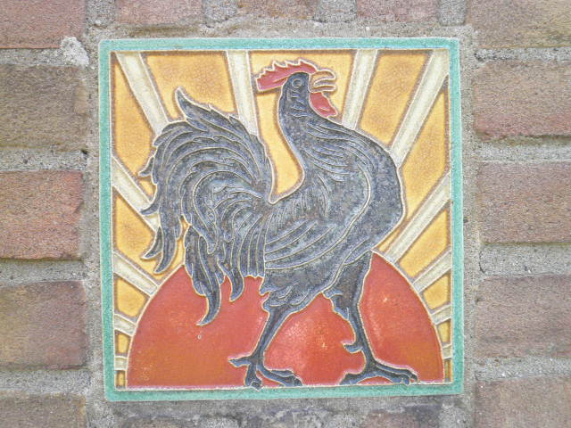 Kunstenaar: Lambert Bodart, en Albert Hahn jr. Zie voor meer informatie: Nederlands Tegelmuseum